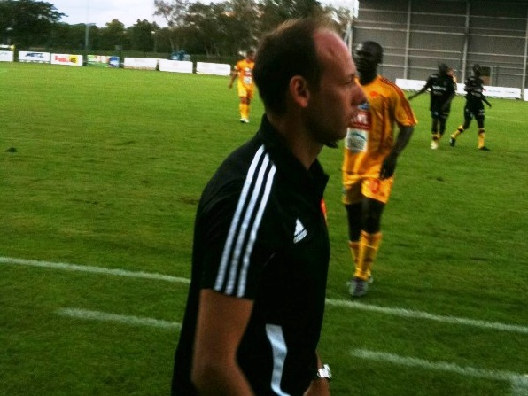 Yann Lachuer lors du match Orléans - Quevilly du 5 aoû 2011